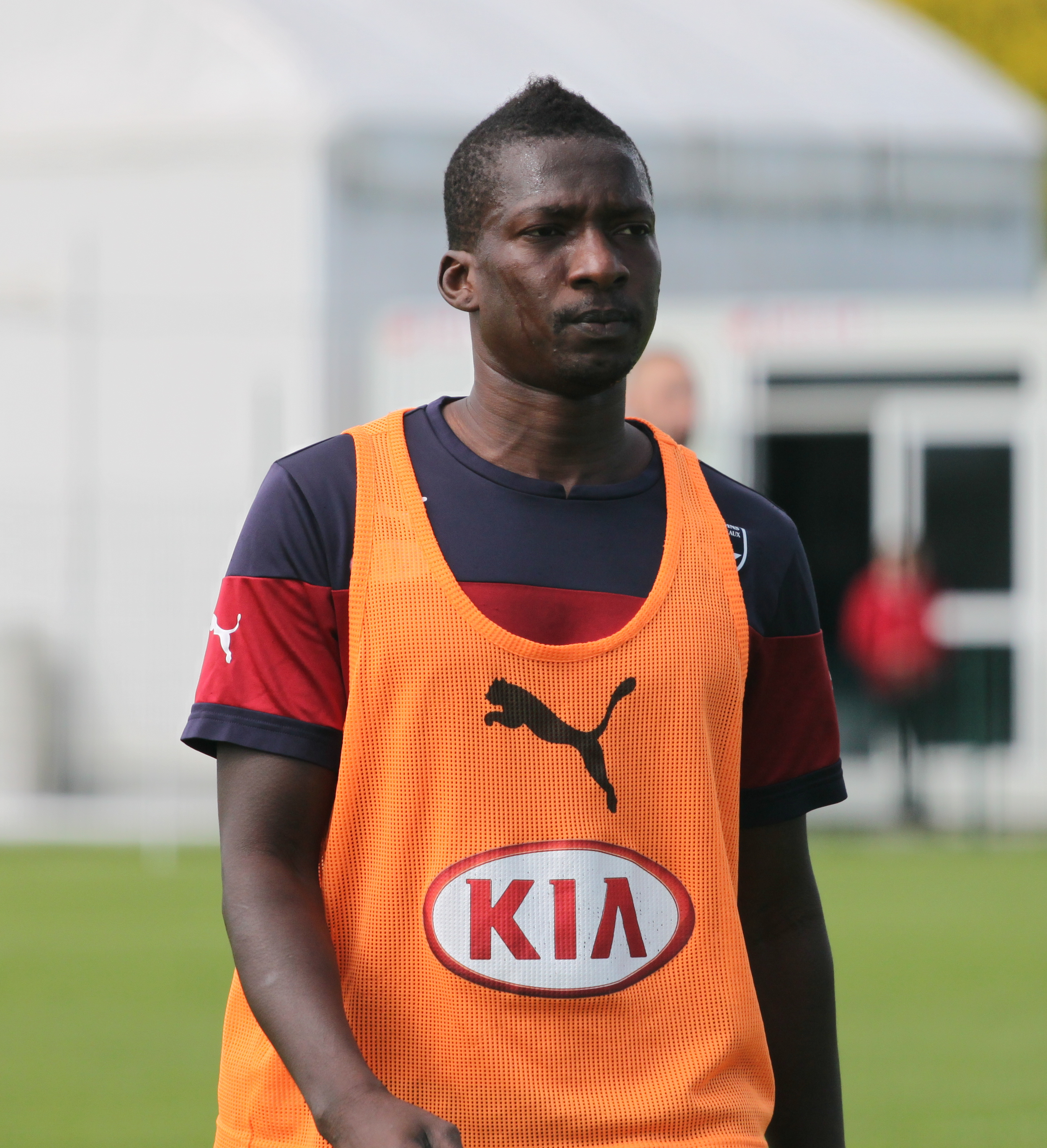 Abdou Traoré à l'entraînement.